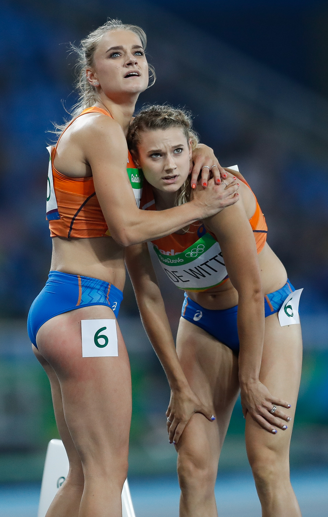 Rio de Janeiro - Eliminatórias do revezamento 4 x 400m nos Jogos Rio 2016, no Estádio Olímpico (Fernando Frazão/Agência Brasil)